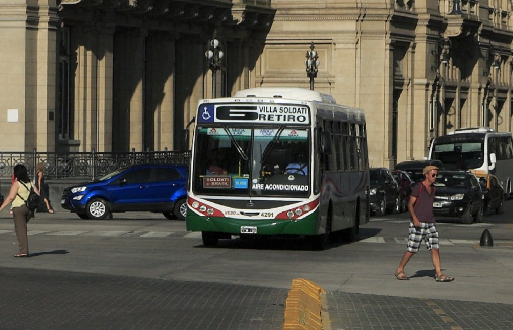 Westseite von der Plaza Lavalle, hier befindet sich der Haupteingang. Die heutige Prachtstraße Avenida 9 de Julio gab es zur Bauzeit des Theaters noch nicht.